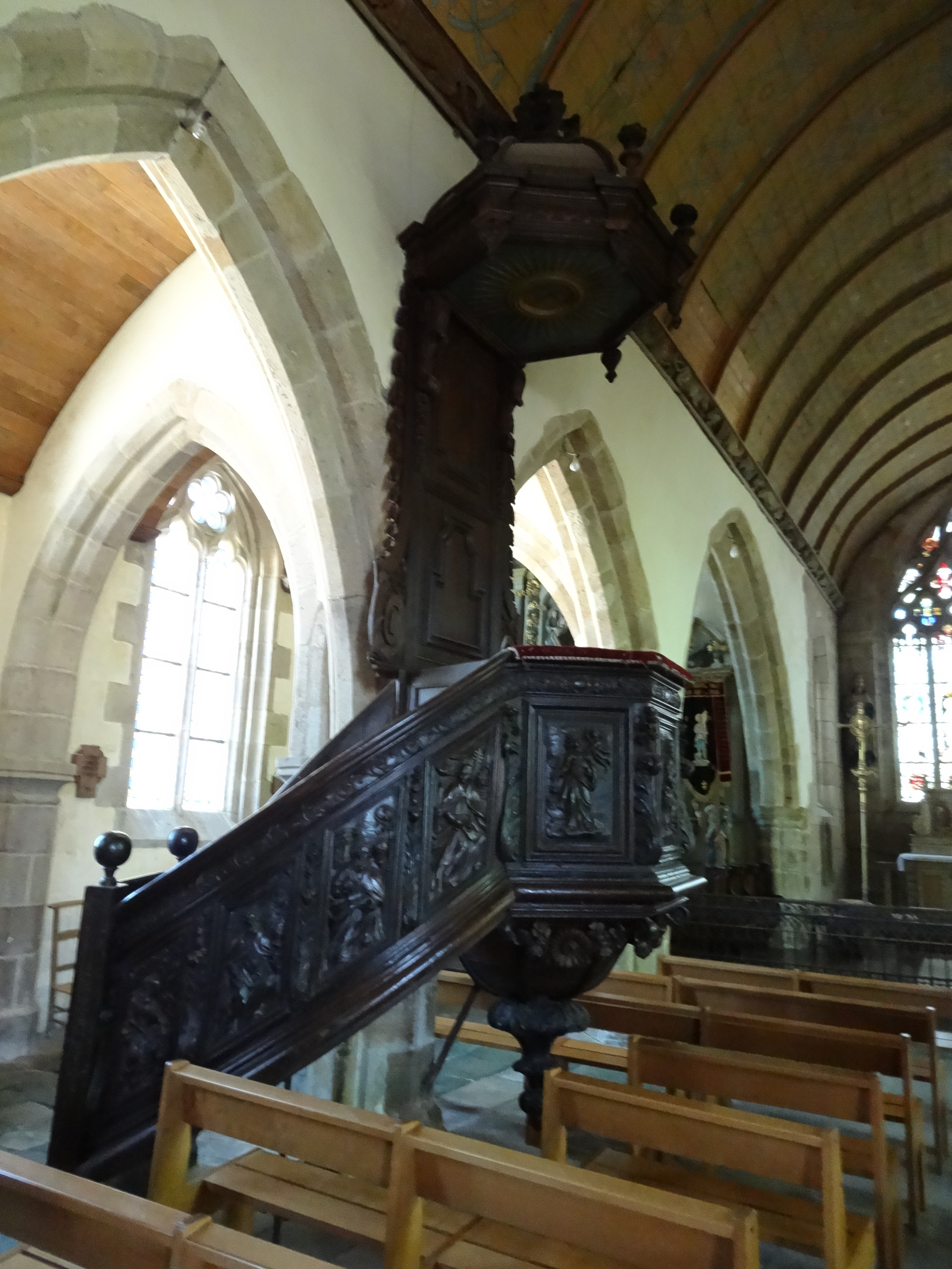 Chaire du XVIIIe siècle de l'église de Runan (Côtes-d'Armor).